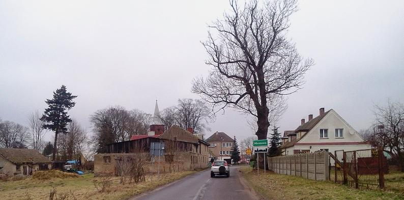 Widok na Mieszewo